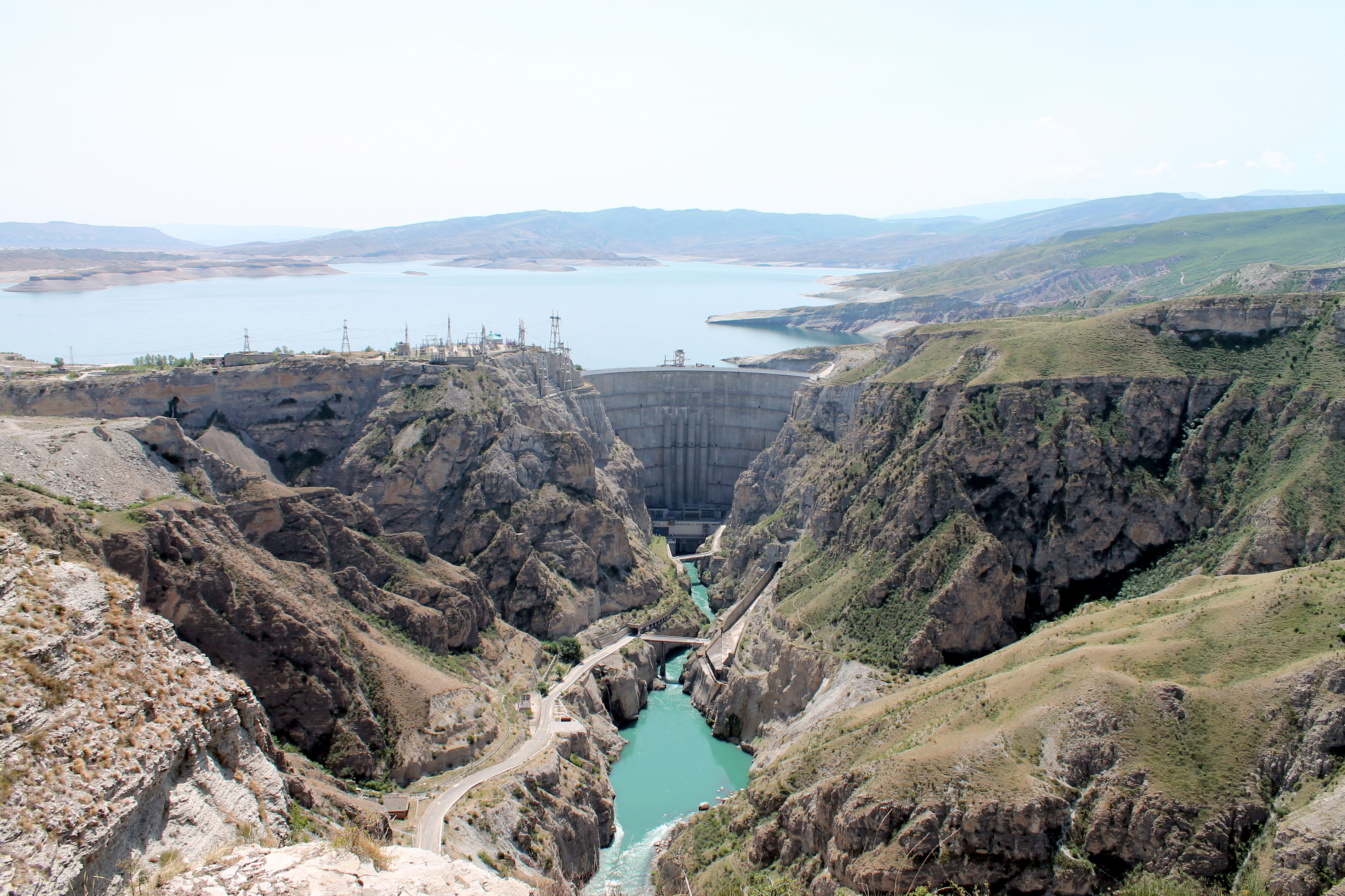 Чиркейская ГЭС